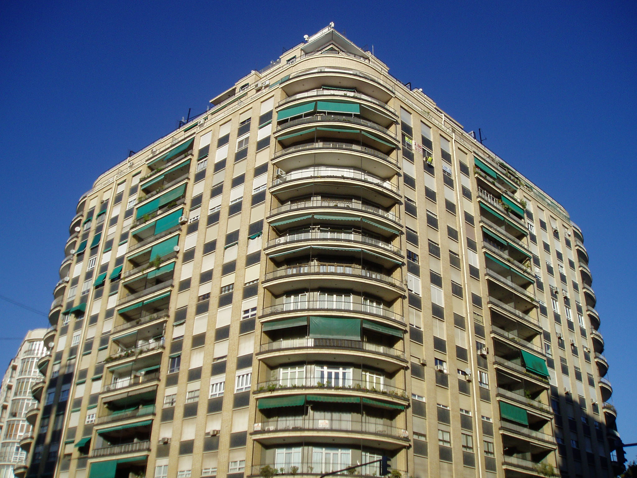 Finca de Ferro, València (Espanya)